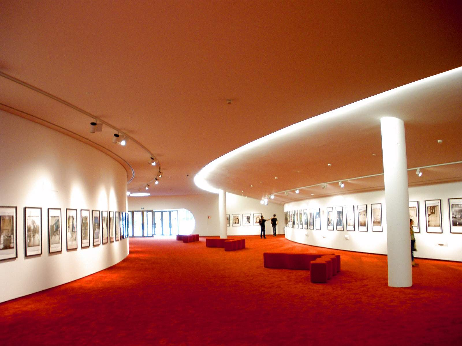 Centro Cultural Internacional Oscar Niemeyer (Avilés, Asturias, España). Auditorio